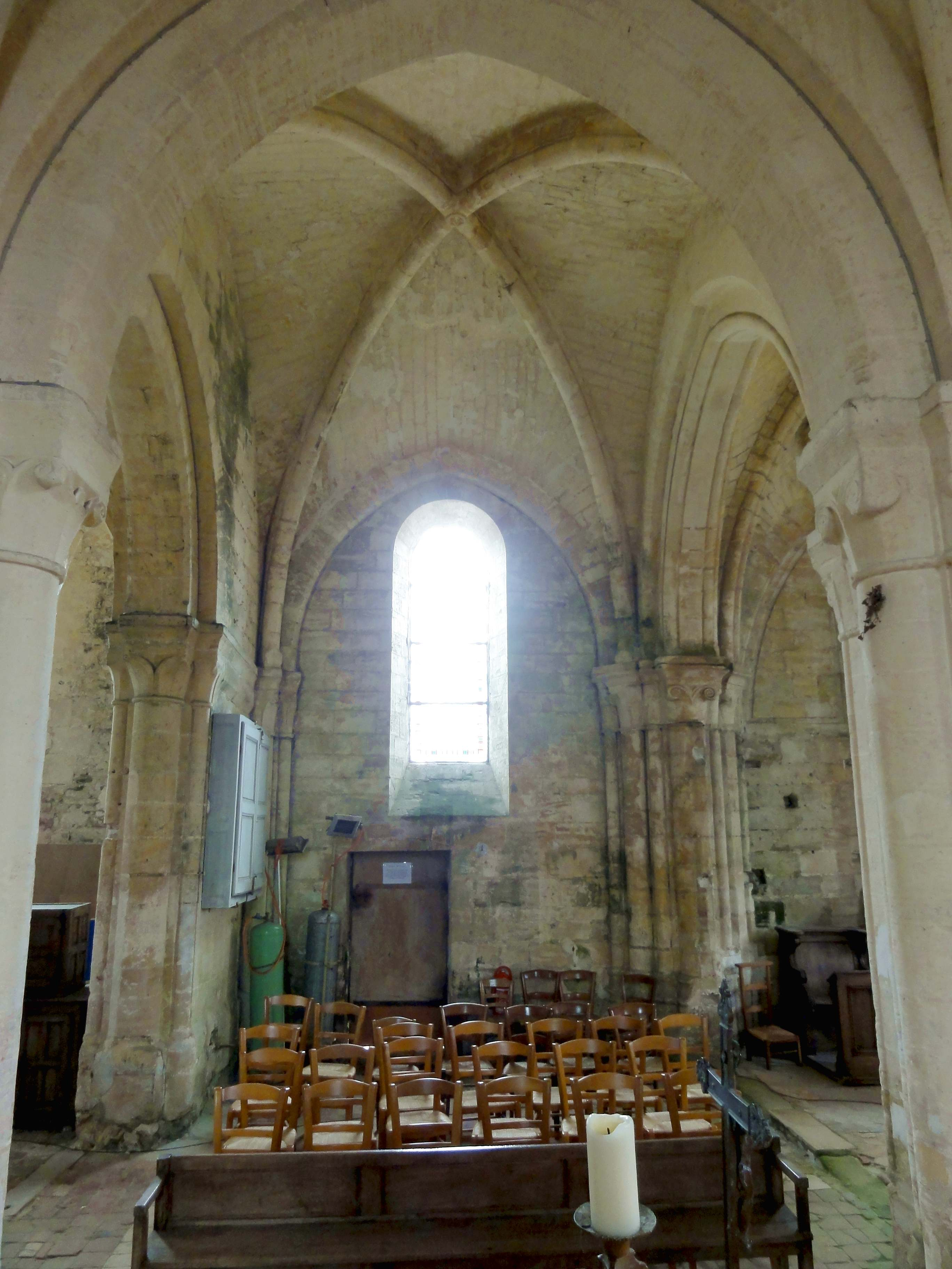 Intérieur de l'église (voir titre).